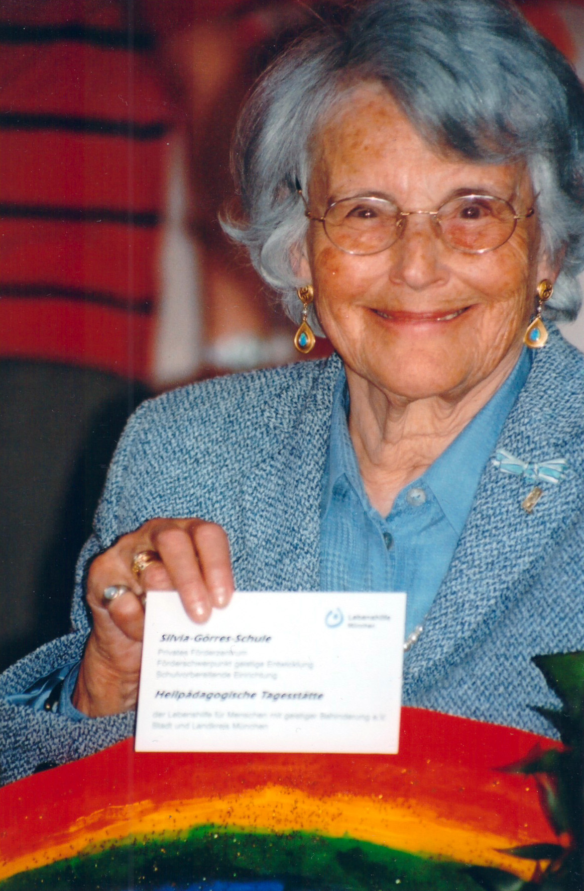 Silvia Görres, anlässlich der Widmung des Privaten Förderzentrums mit Schule und Heilpädagogischer Tagesstätte der Lebenshilfe München